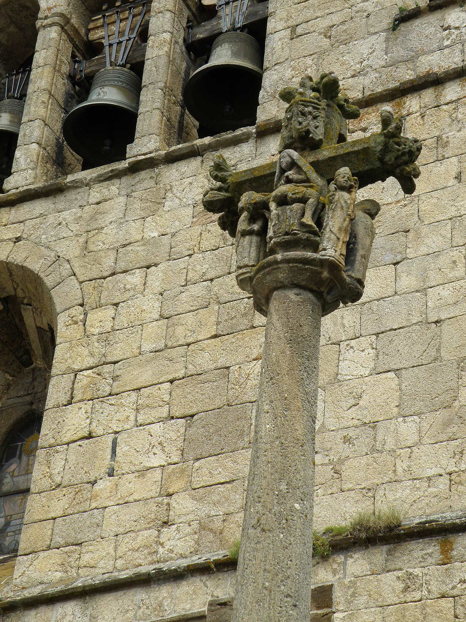 Arlempdes, comm. de la Haute-Loire, France (région Auvergne). Calvaire près de l'entrée de l'église.